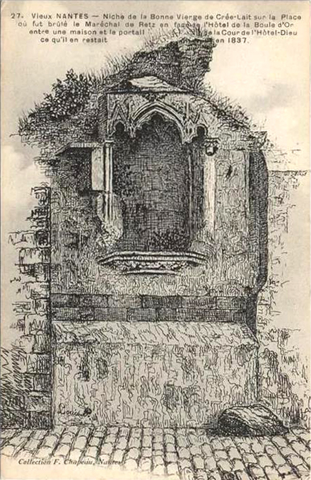 Vieux Nantes, niche de la Bonne Vierge de Crée-Lait.